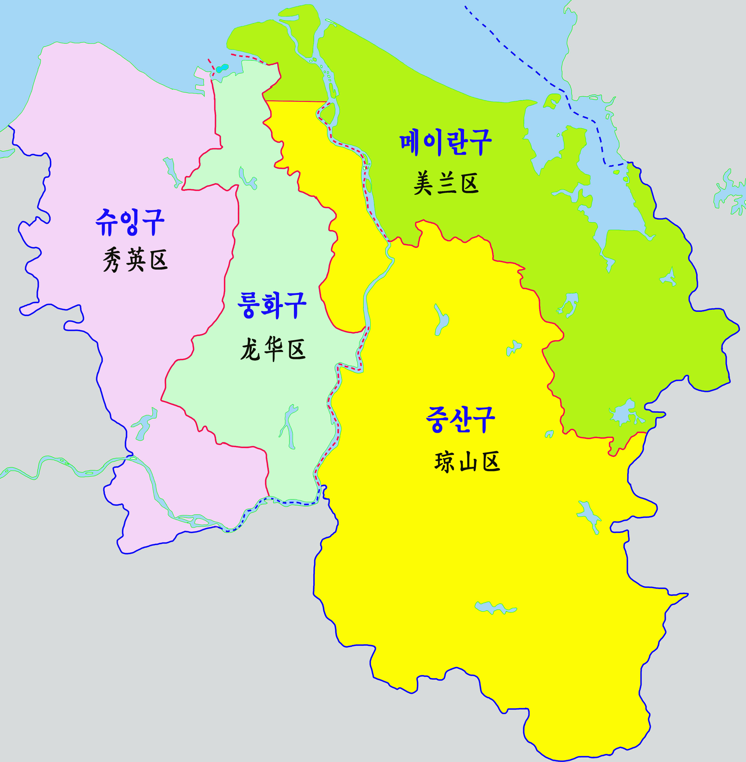 하이코우 행정구역